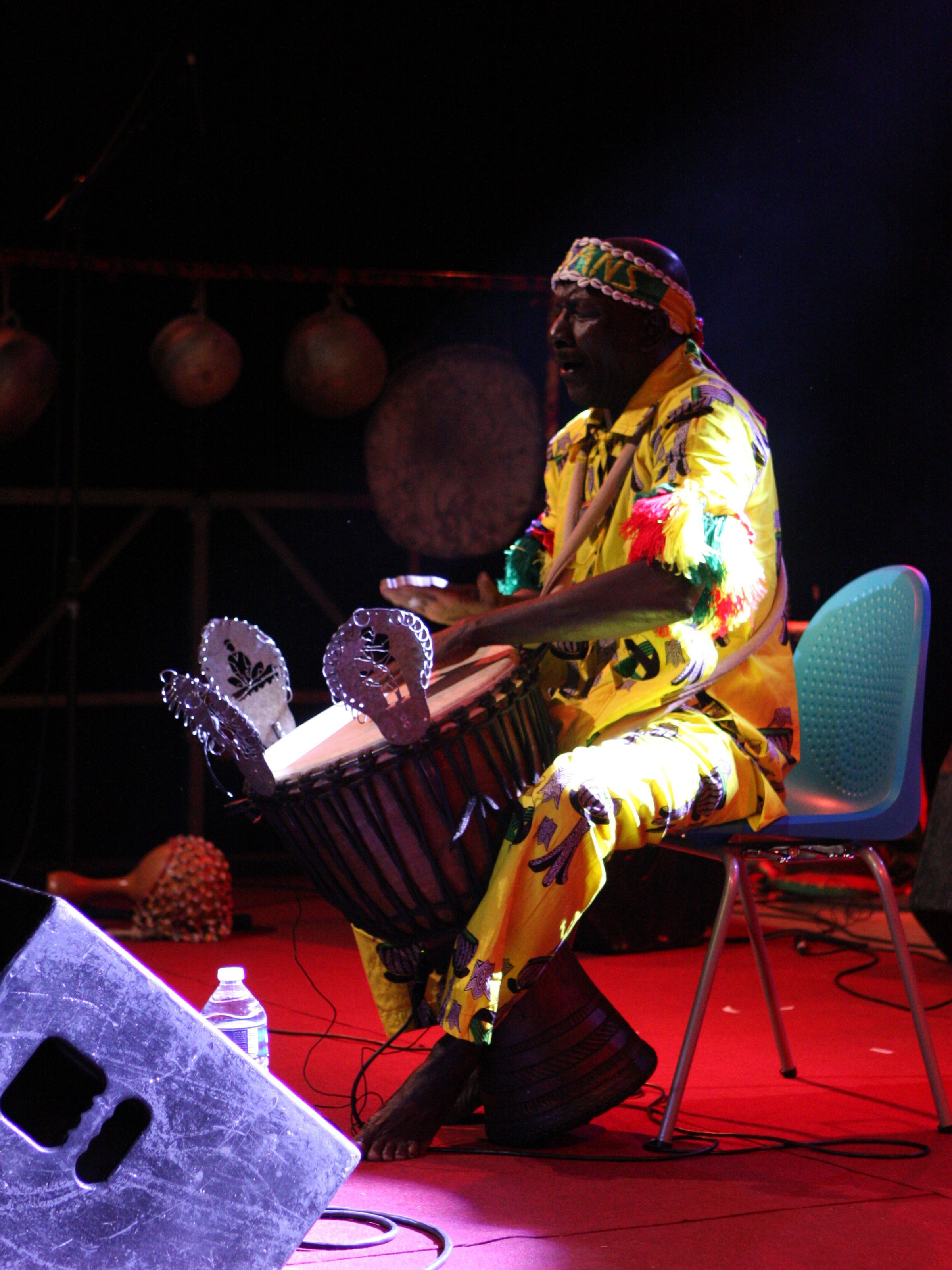 Adama Dramé en concert, juin 2016